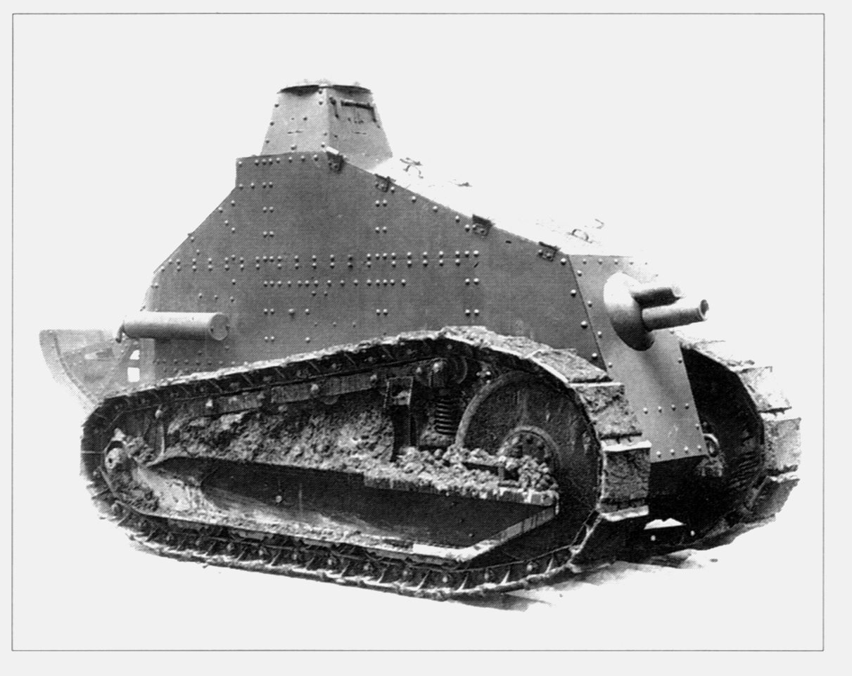 Digitale reproductie foto van het prototype van de FT-17 BS tank